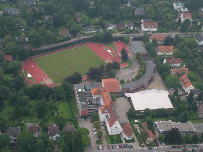 Stormarnschule Ahrensburg Germany aerial view